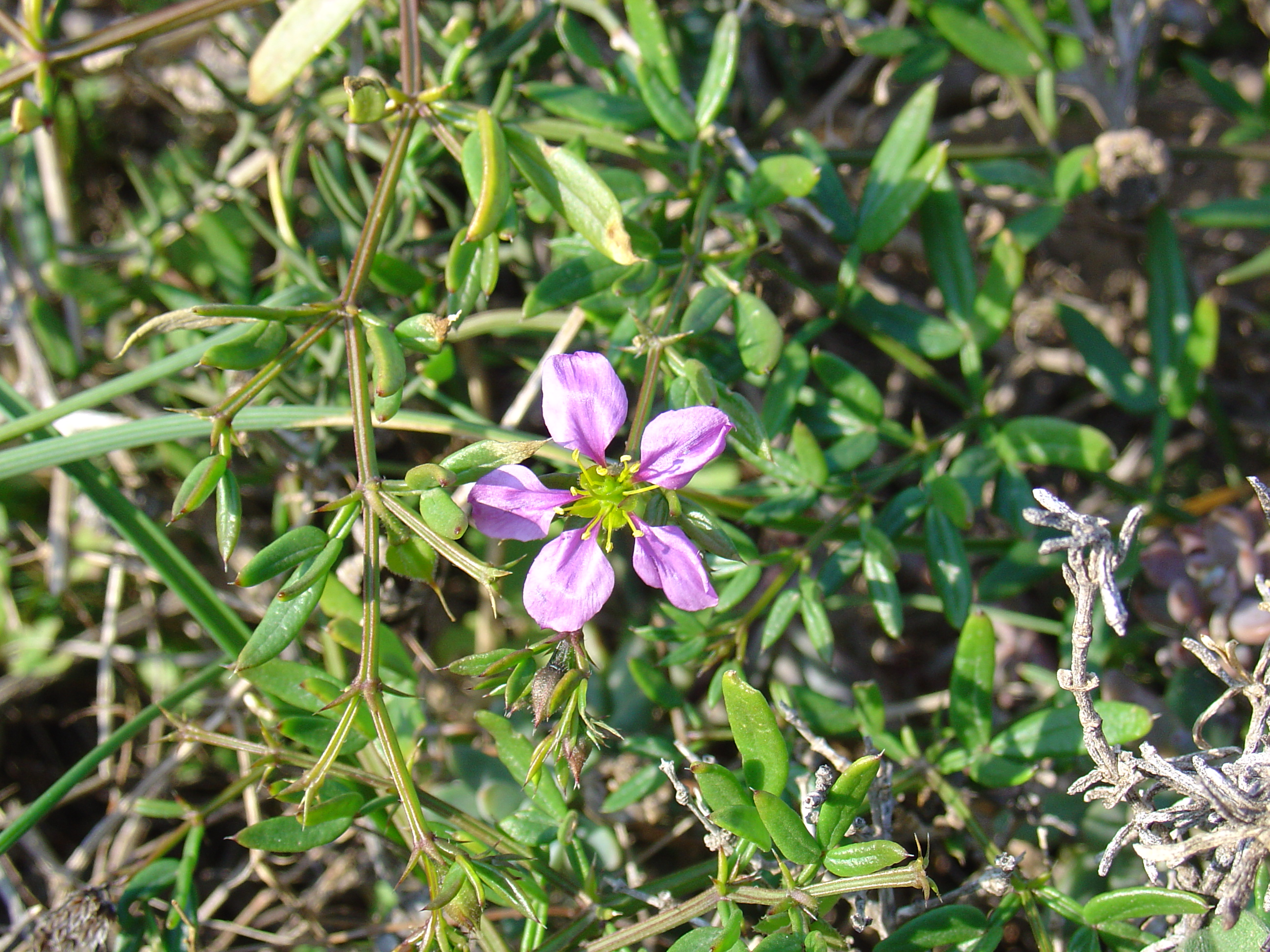 Fagonia cretica from Cabo de Palos, Murcia, Spain